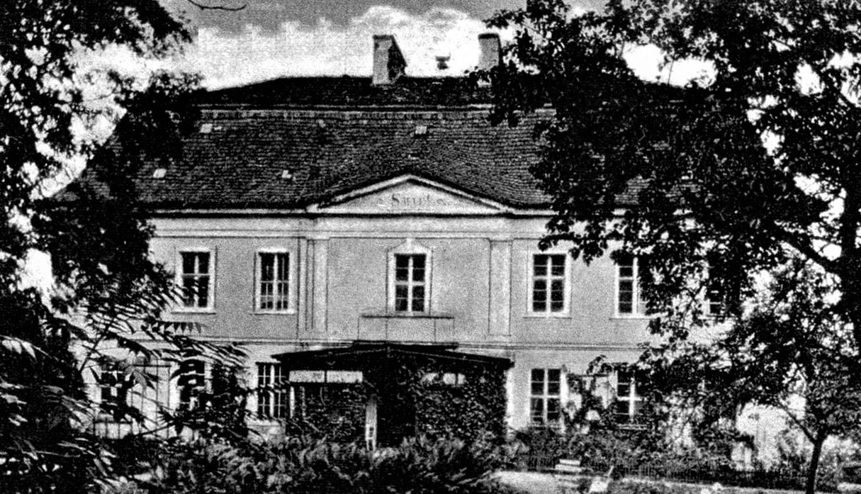 Pałac. Żelazny Most